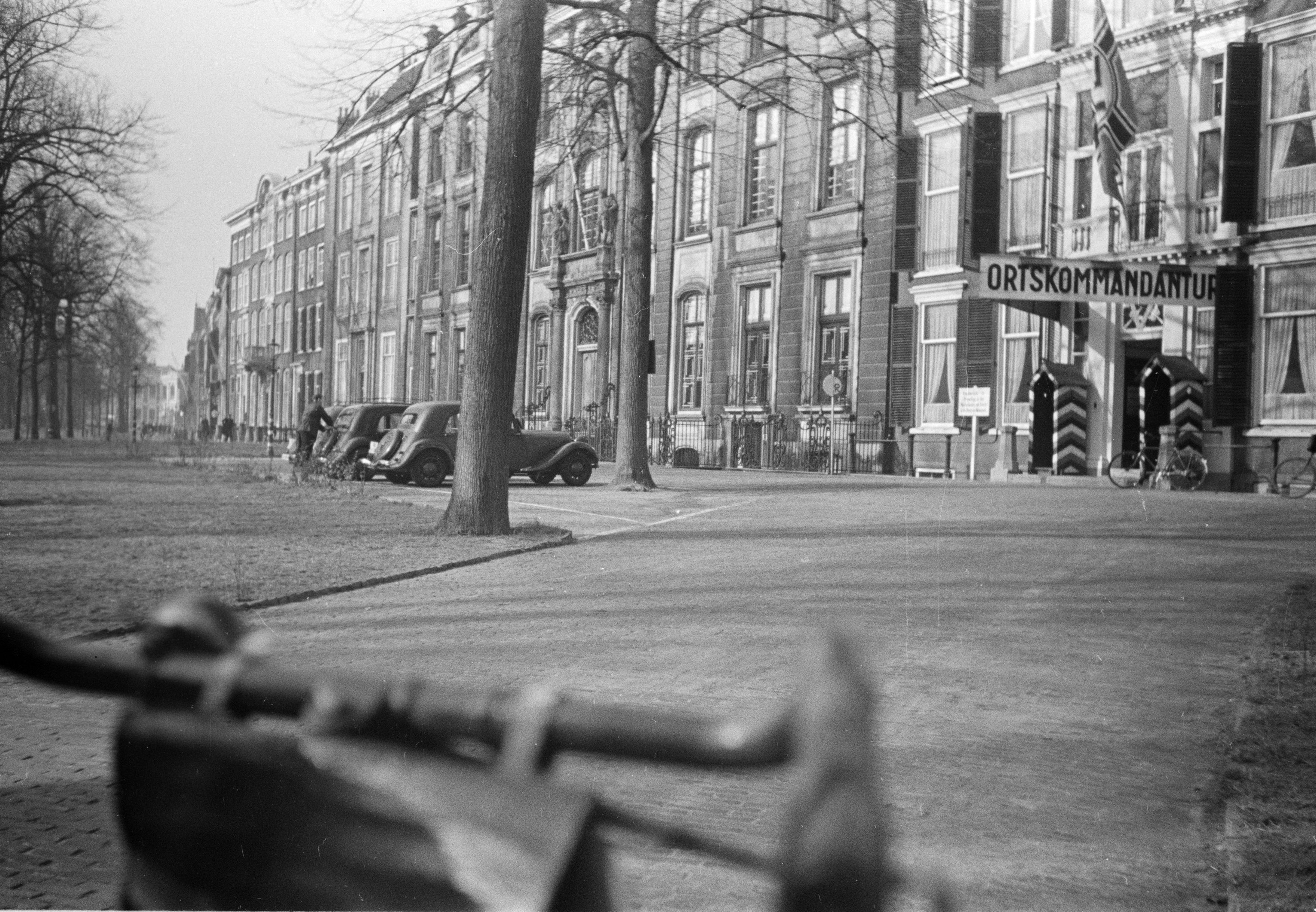 Foto uit de collectie Huizinga van het NIOD. De Ortskommandantur aan het Lange Voorhout. Menno Huizinga was onderdeel van de Ondergedoken Camera en maakte illegaal foto’s tijdens de bezetting. Dit deed hij hoofdzakelijk in zijn woonplaats Den Haag.